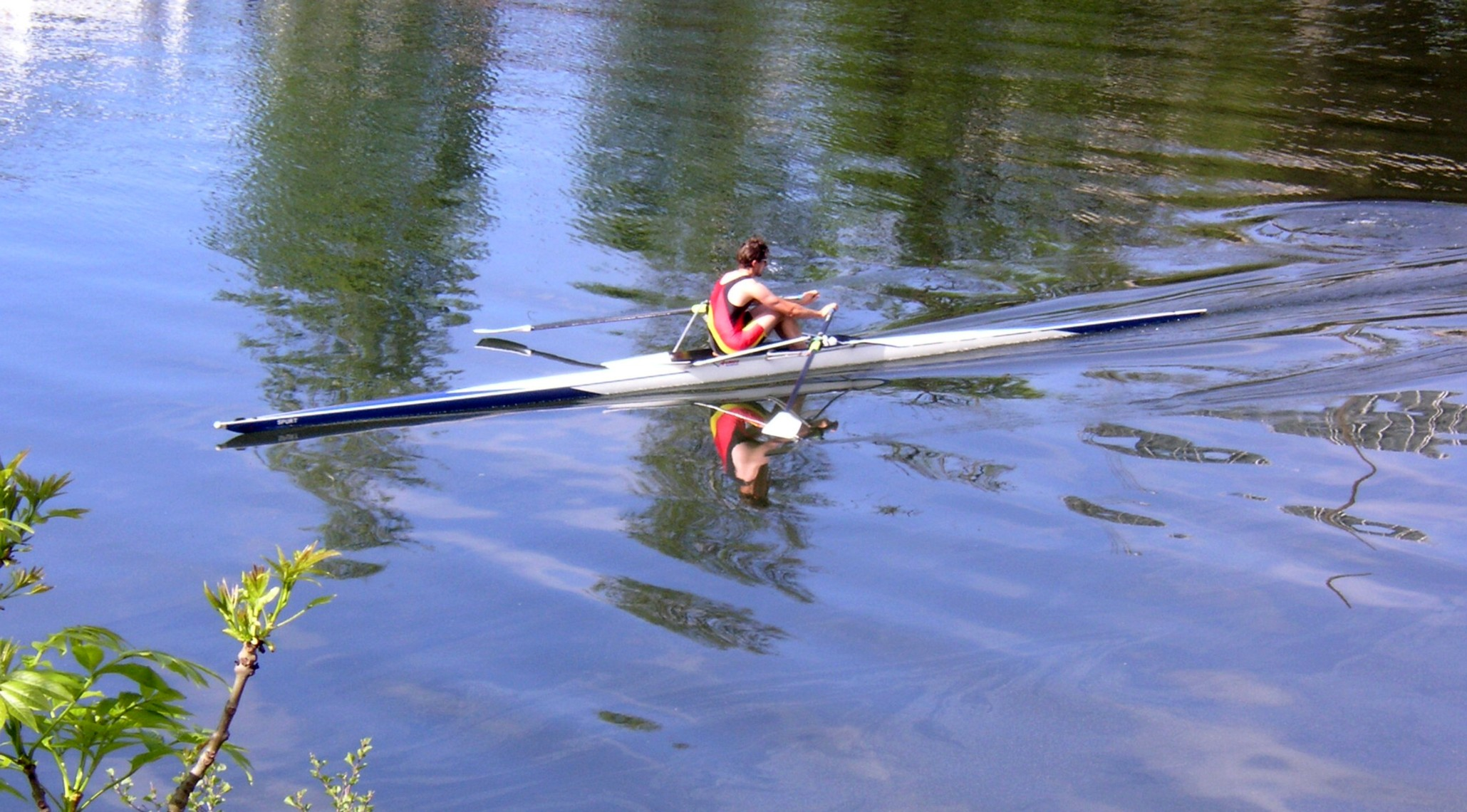 En singelsculler på Mälaren, Stockholm.